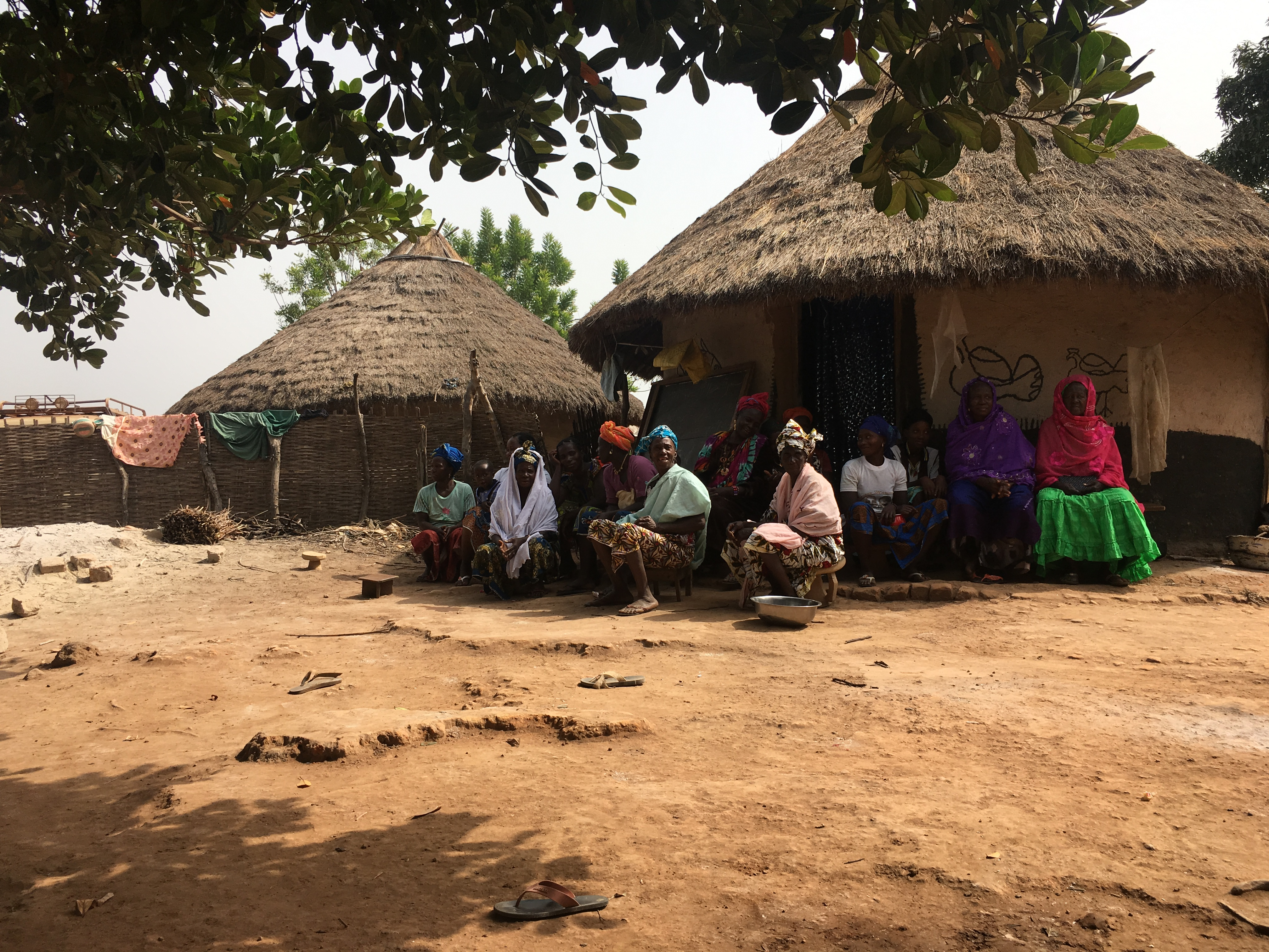 Dorf unweit von Gaoual